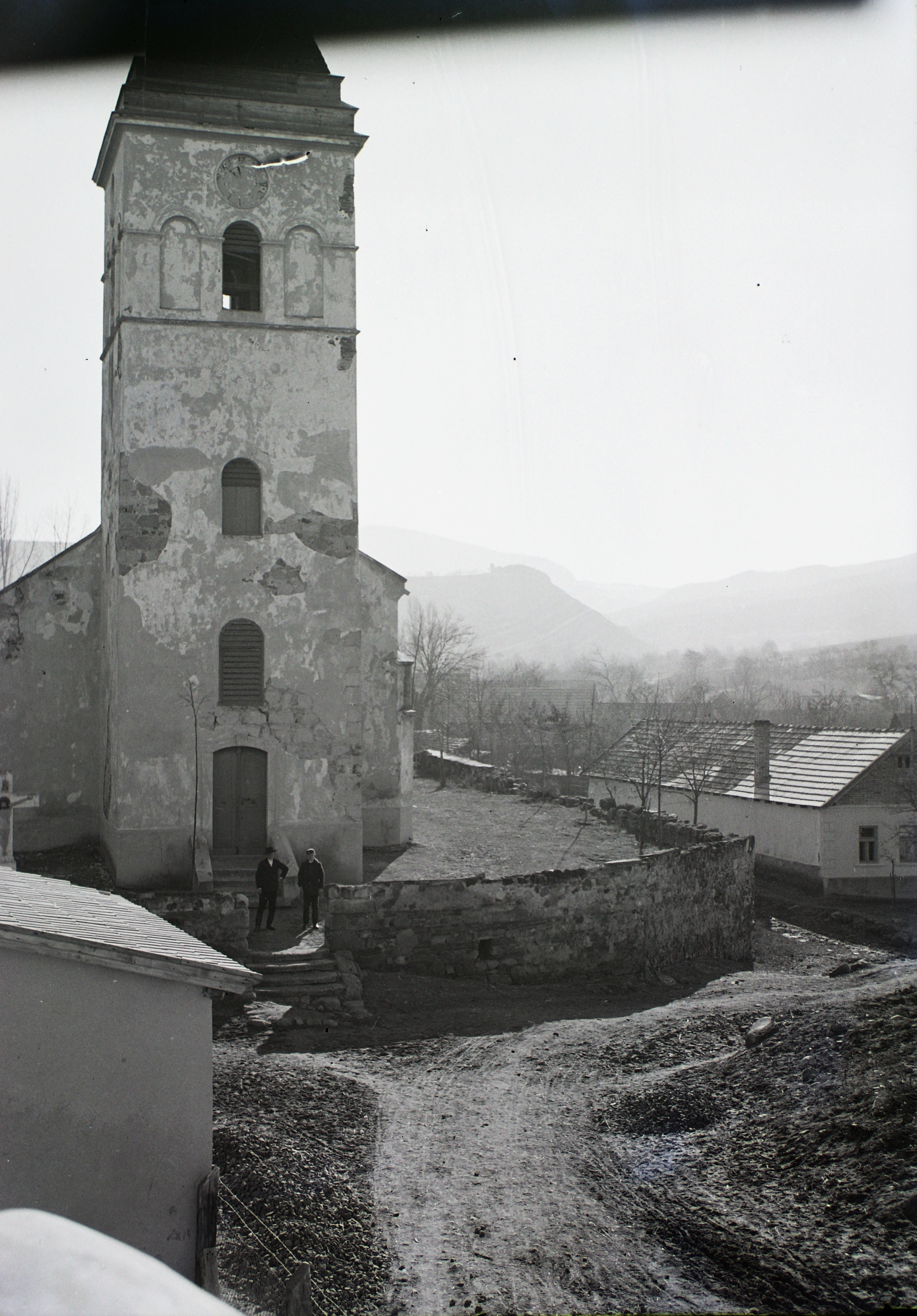 Hasznos (ekkor önálló, ma a város része), Mária Magdolna-templom. Location: Hungary Title: Hasznos (ekkor önálló, ma a város része), Mária Magdolna-templom.